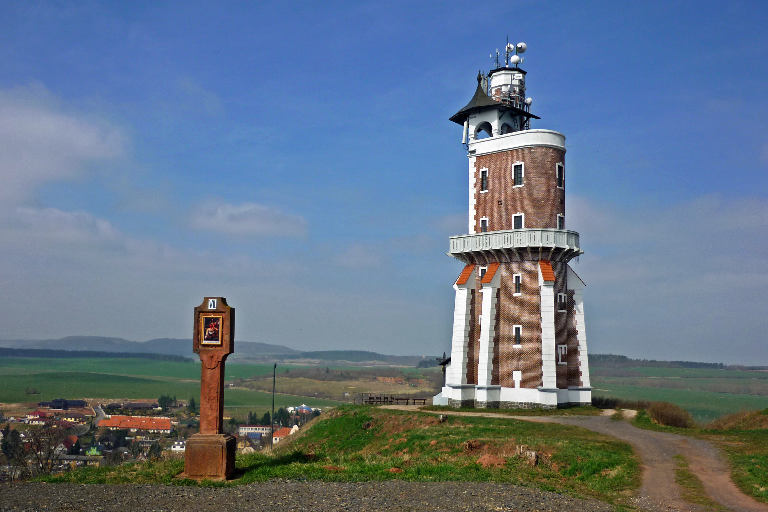 Schillerwarte - Aussichtsturm bei Kriegern (Kryry) – Architekt und Baumeister Alois Kaiser, sowie Kreuzwegstation